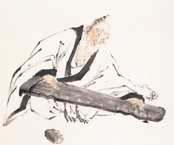 玉堂寿像 浦上春琴筆 紙本墨画淡彩 林原美術館